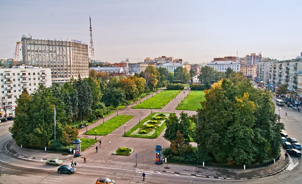 Общий вид площади Горького с высоты